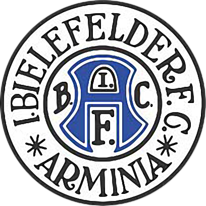 Logo von Arminia Bielefeld nach dem Ersten Weltkrieg